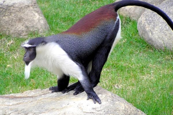 Mačiak Rolowayov (Cercopithecus roloway)